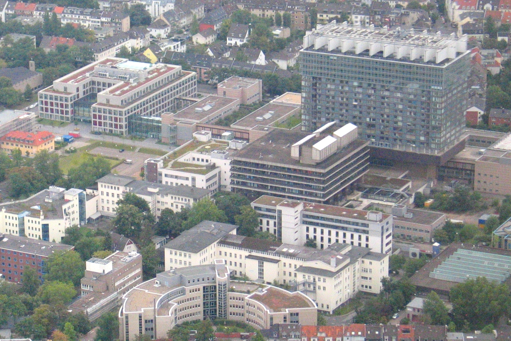 Uniklinik Köln aus der Luft (Nordansicht)